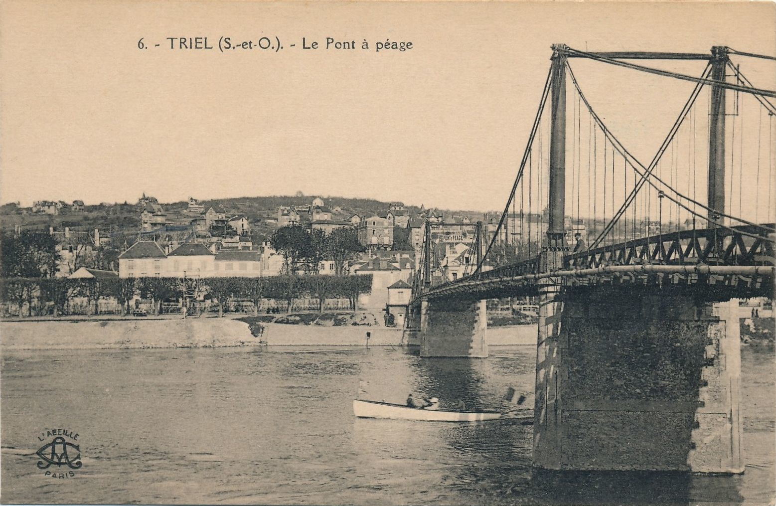 Pont à péage de Triel-sur-Seine (Yvelines, France), construit en 1838, détruit en 1940.